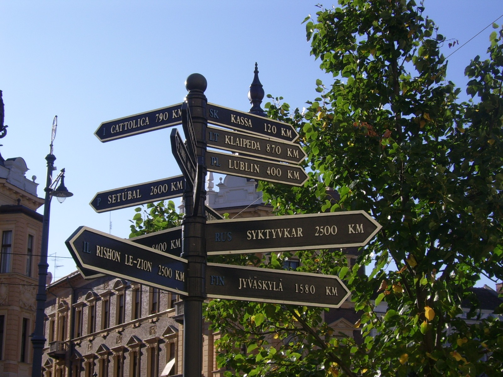 Debrecen testvérvárosairól szóló táblák. Eredetileg Szerkesztő:Madura mate töltötte fel a képet a magyar nyelvű Wikipédiára. A magyar Wikipédián adott licence: GFDL. Eredeti megjegyzés: "A testvérvárosok táblája".